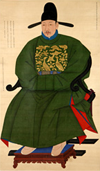 보한재 신숙주 영정, 1749년작